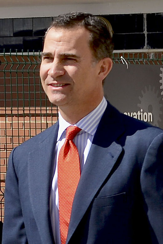 El Príncipe Felipe participó en la inauguración deI Congreso de Viveros de Empresas de Sevilla titulado "España, Europa y América, unidas por la Innovación, la Tecnología y la Excelencia".